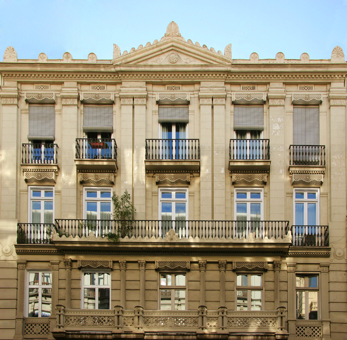 Casa particular calle La Paz núm. 26, Valencia, Spain.